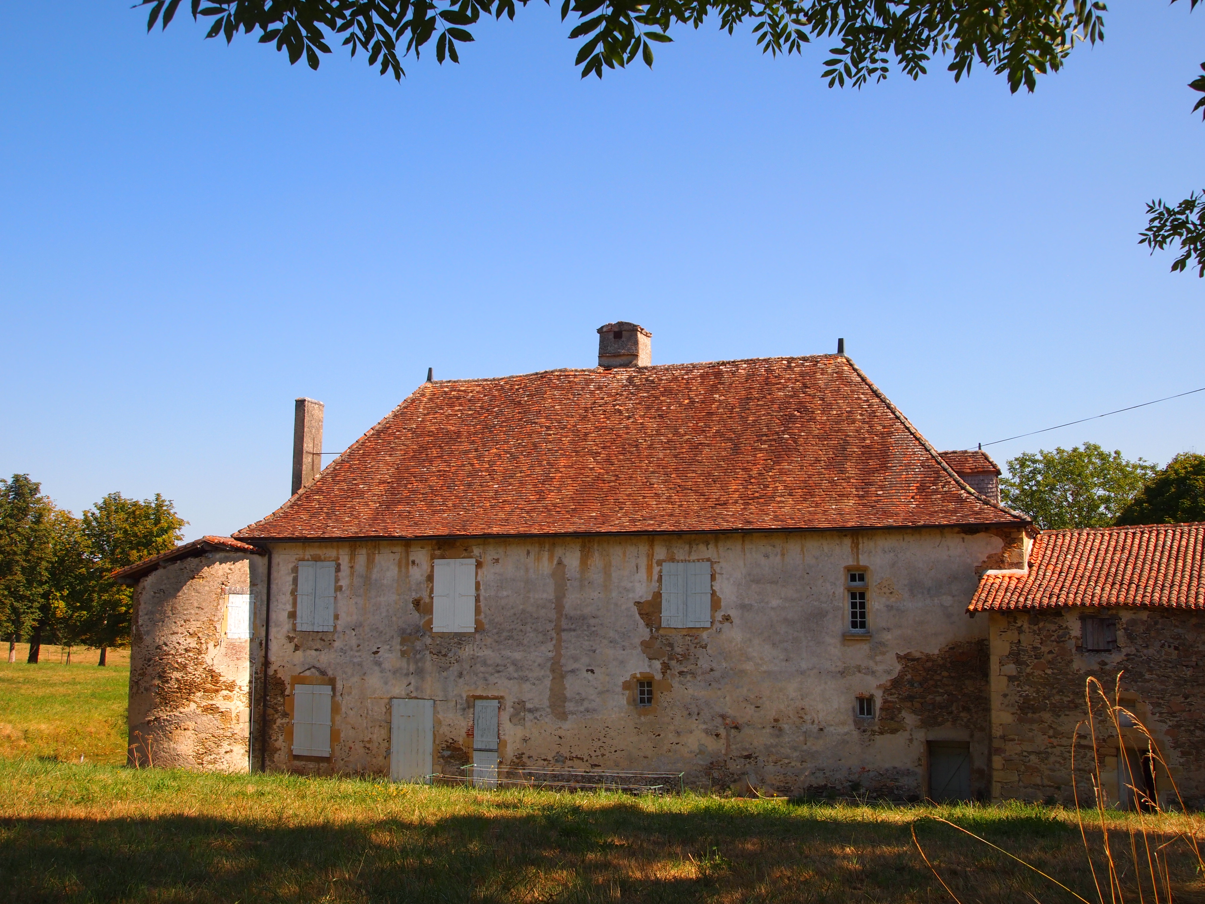 Logis de la Villatte, à Ansac-sur-Vienne en Charente (inscrit, 1991)